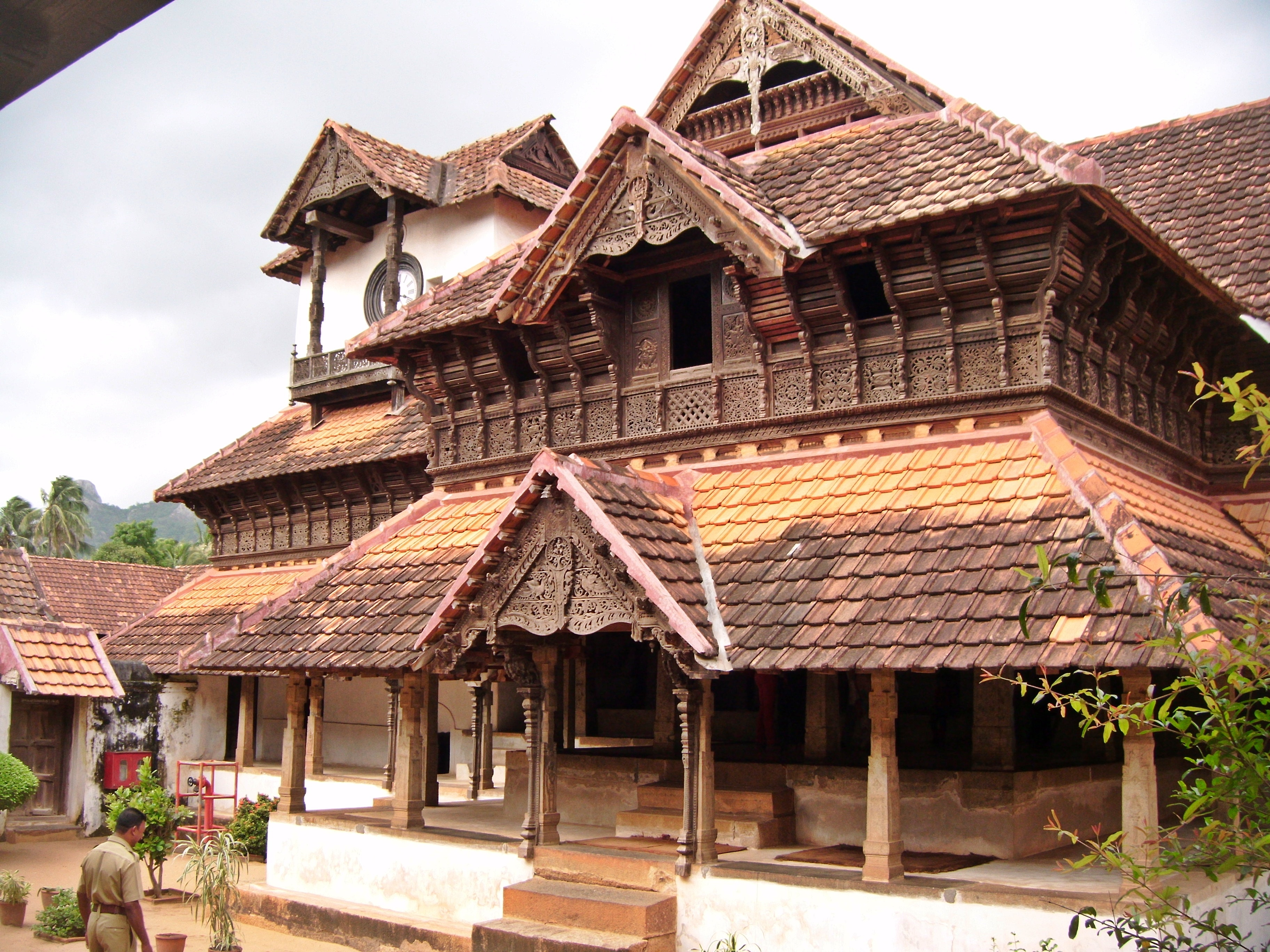 Padmanabhapuram Palace, Tamil Nadu, Indien. Gebäude mit Audienzsaal.